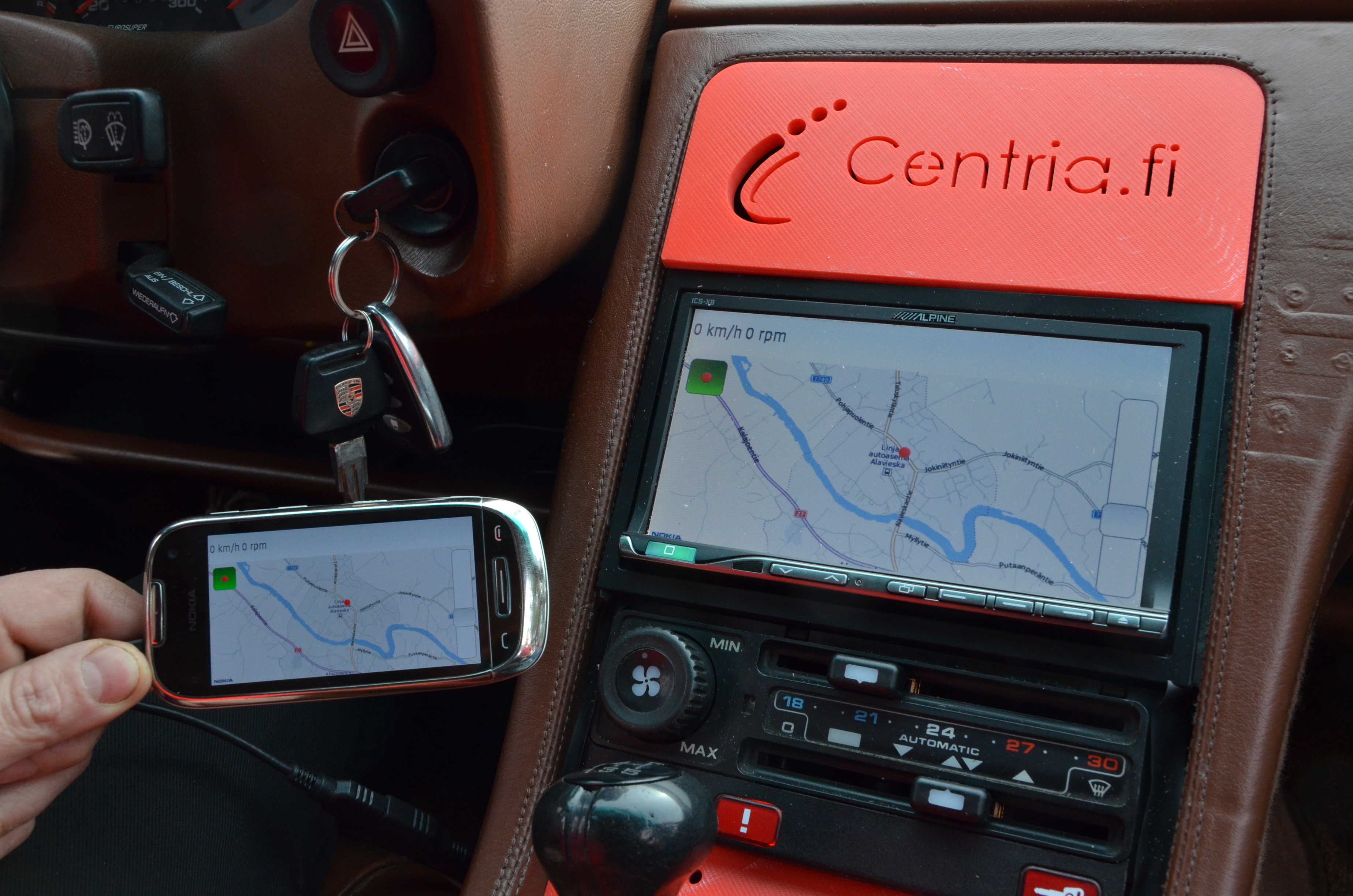 Esimerkiksi Centria ammattikorkeakoulu osallistuu muun muassa hankkeisiin, joissa pohditaan liikennetiedon hyödyntämistä kuljettajan hyödyksi.